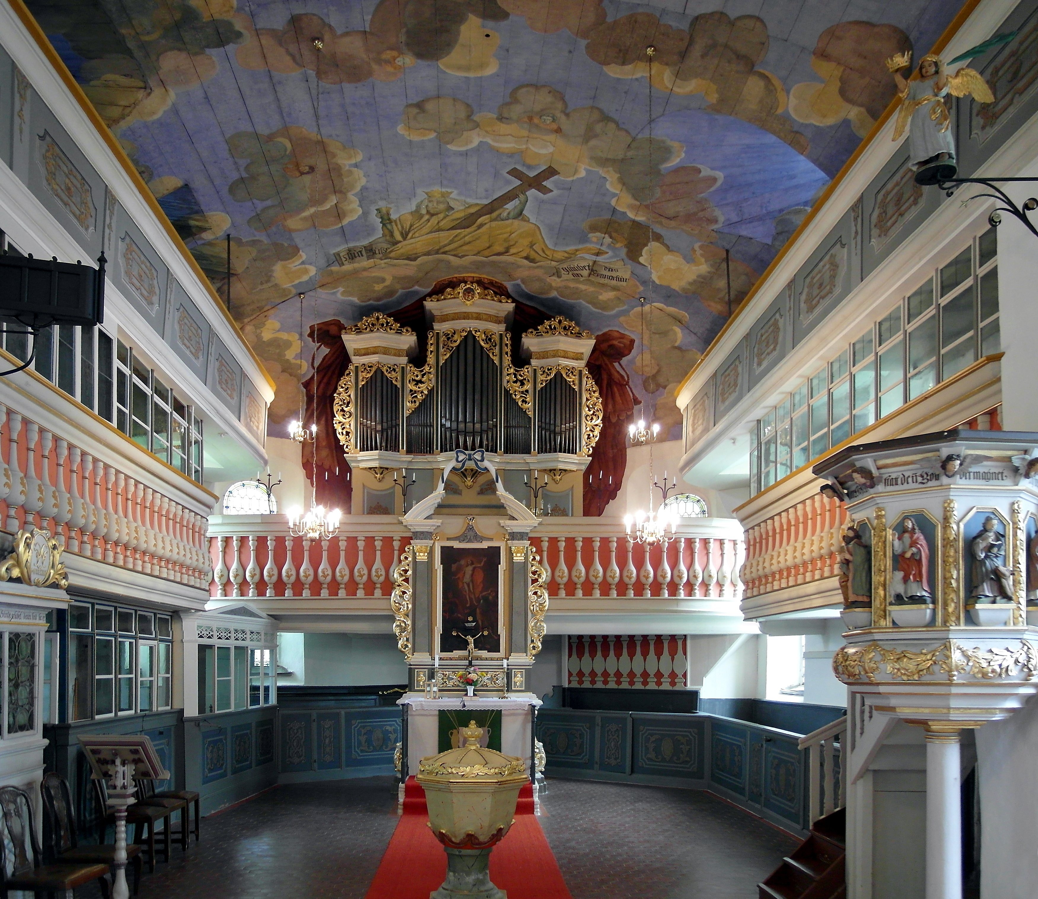 11.07.2018 09619 Helbigsdorf (Mulda): Evangelische Dorfkirche, Hauptstraße (GMP: 50.811503,13.365515). Spätgotik aus dem 14./15. Jahrhundert, 1576 und 1726 erweitert. Überwiegend barocke Ausstattung. Blick zum Altar und der dahinter liegenden Orgelempore. Die Orgel hat Gottfried Silbermann in den Jahren 1726-1728 erschaffen. Sie zählt zu den kleinsten zweimanualigen Orgeln Silbermanns, besitzt 1008 Pfeifen und 17 Register. [SAM6721-6722.JPG]20180711330MDR.JPG(c)Blobelt